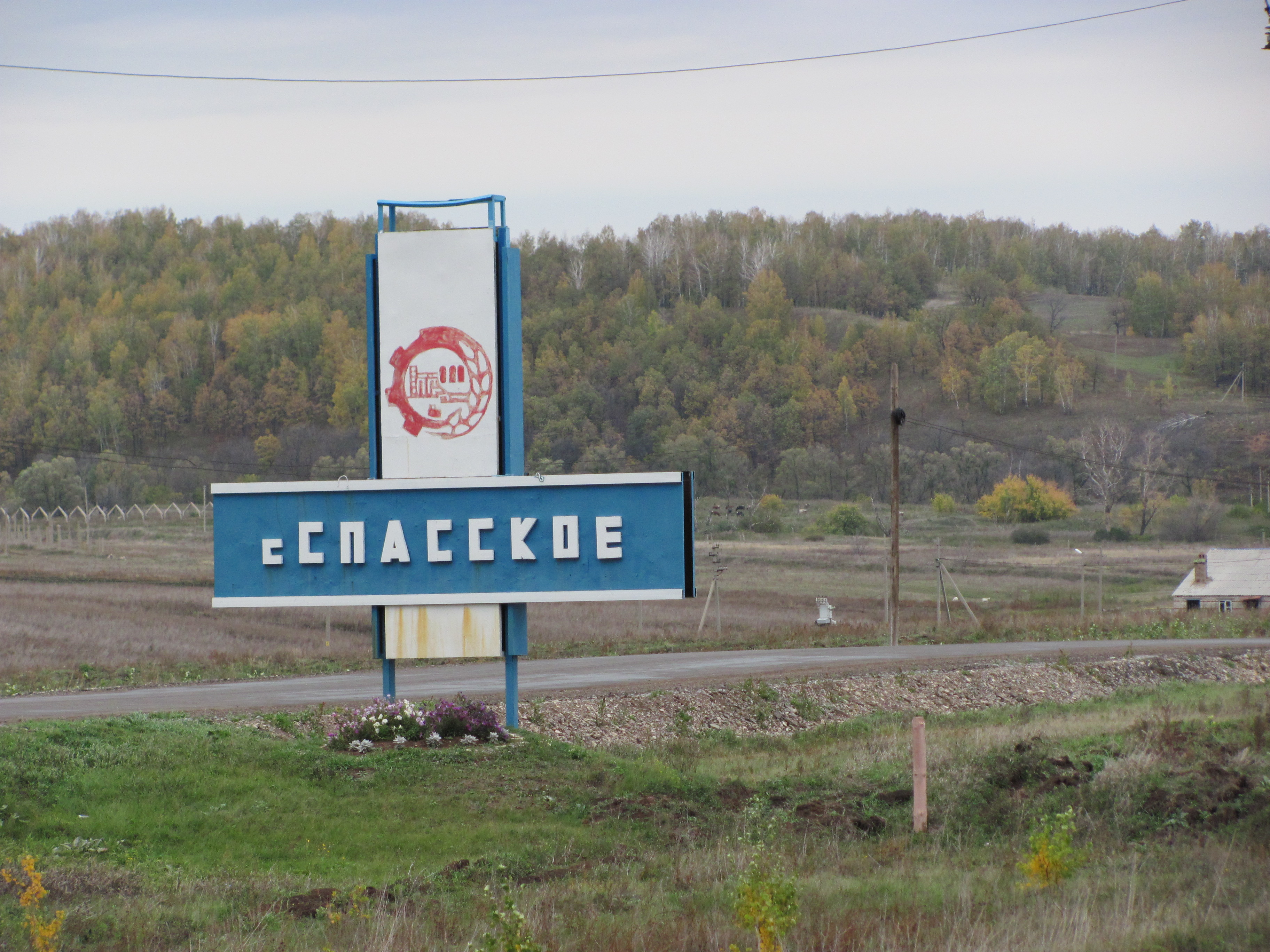 Бугульминское шоссе, Спасское